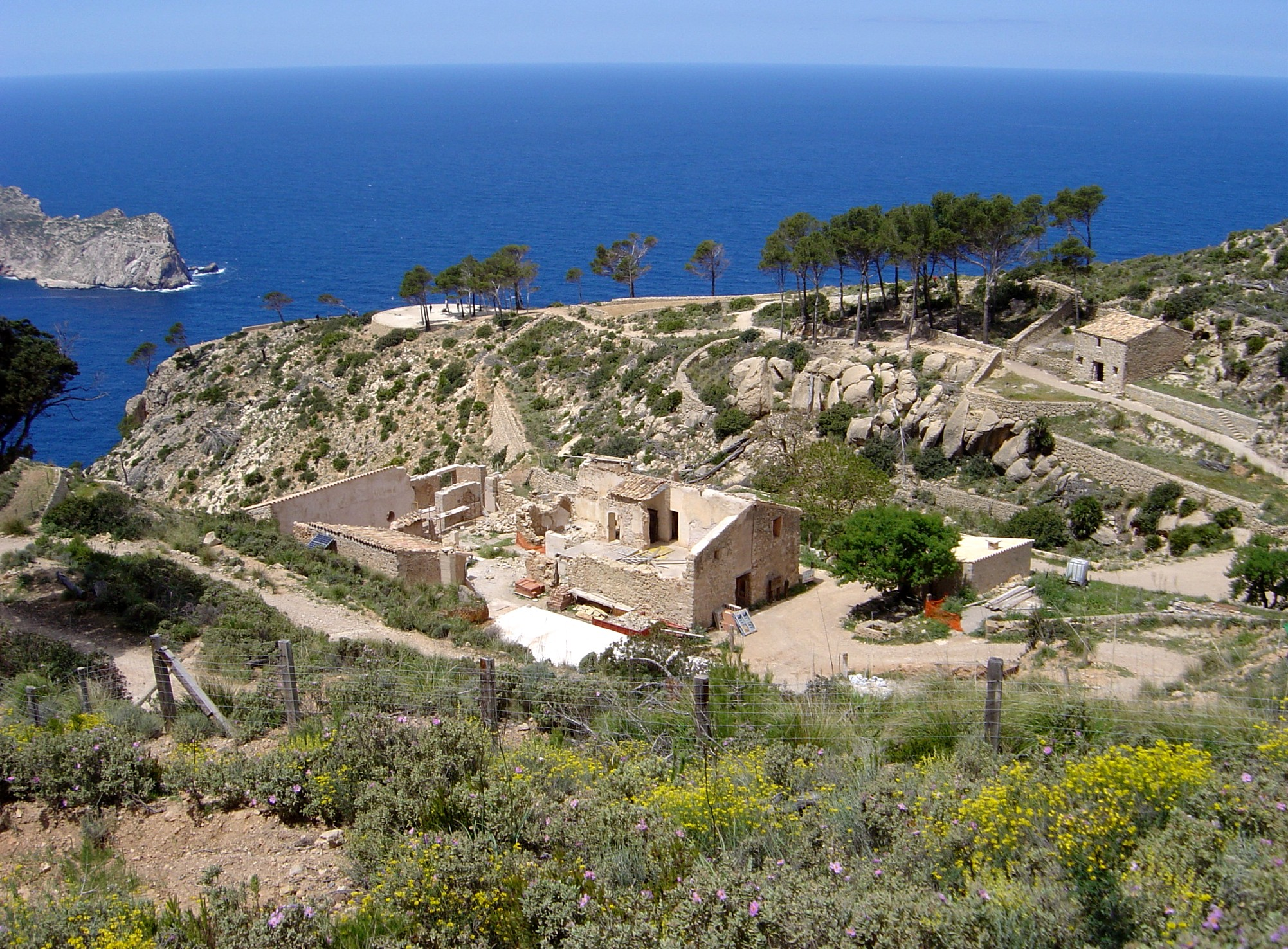 La Trapa. Andratx. Mallorca.